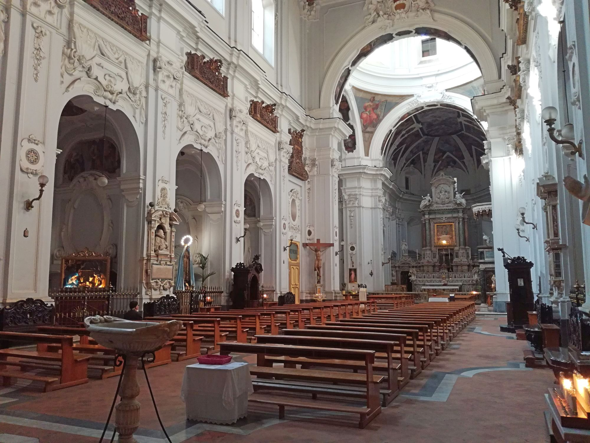 Interno Santa Maria di Costantinopoli (Napoli)